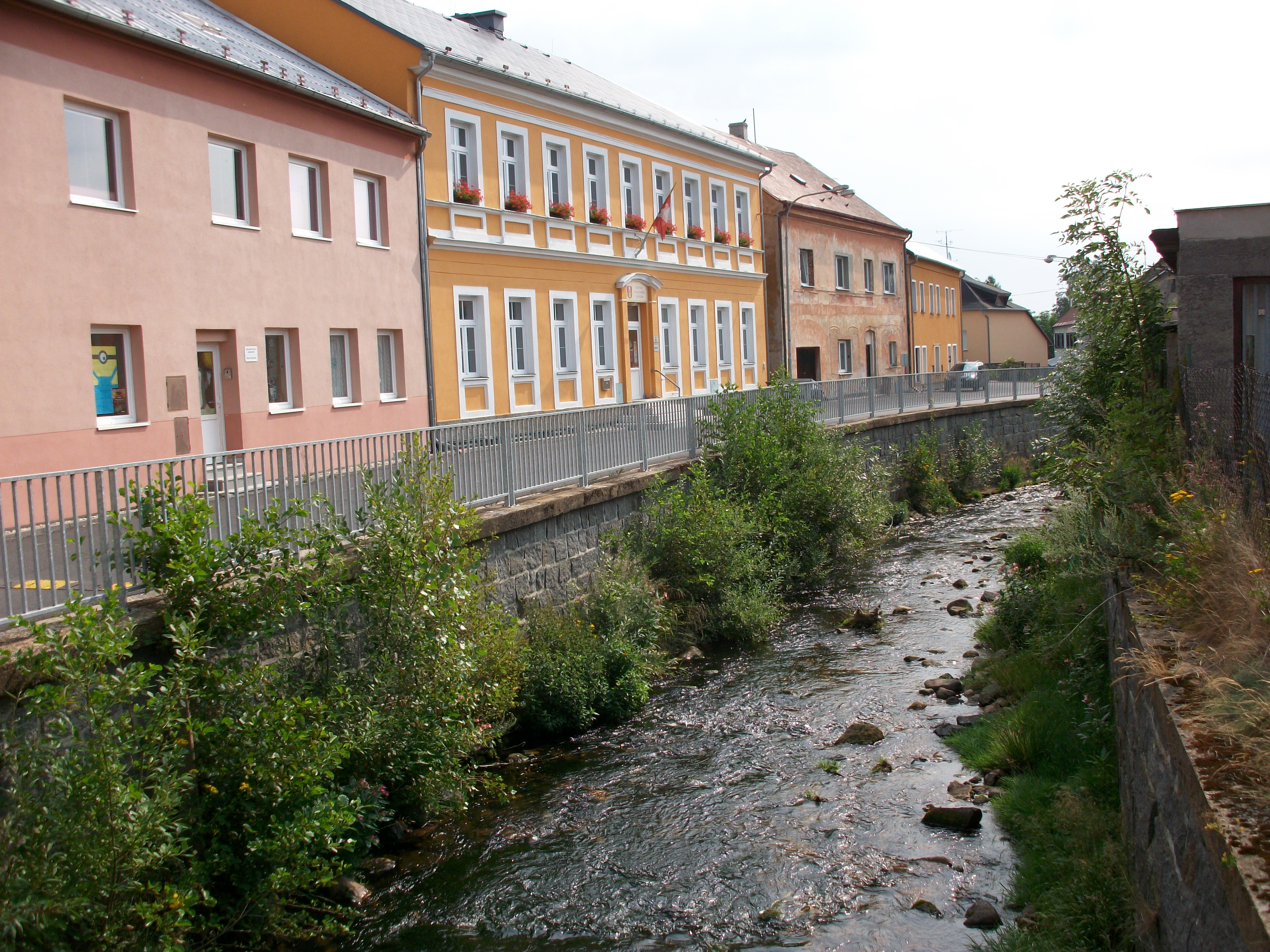 Houses in Merklín near Bystřice river